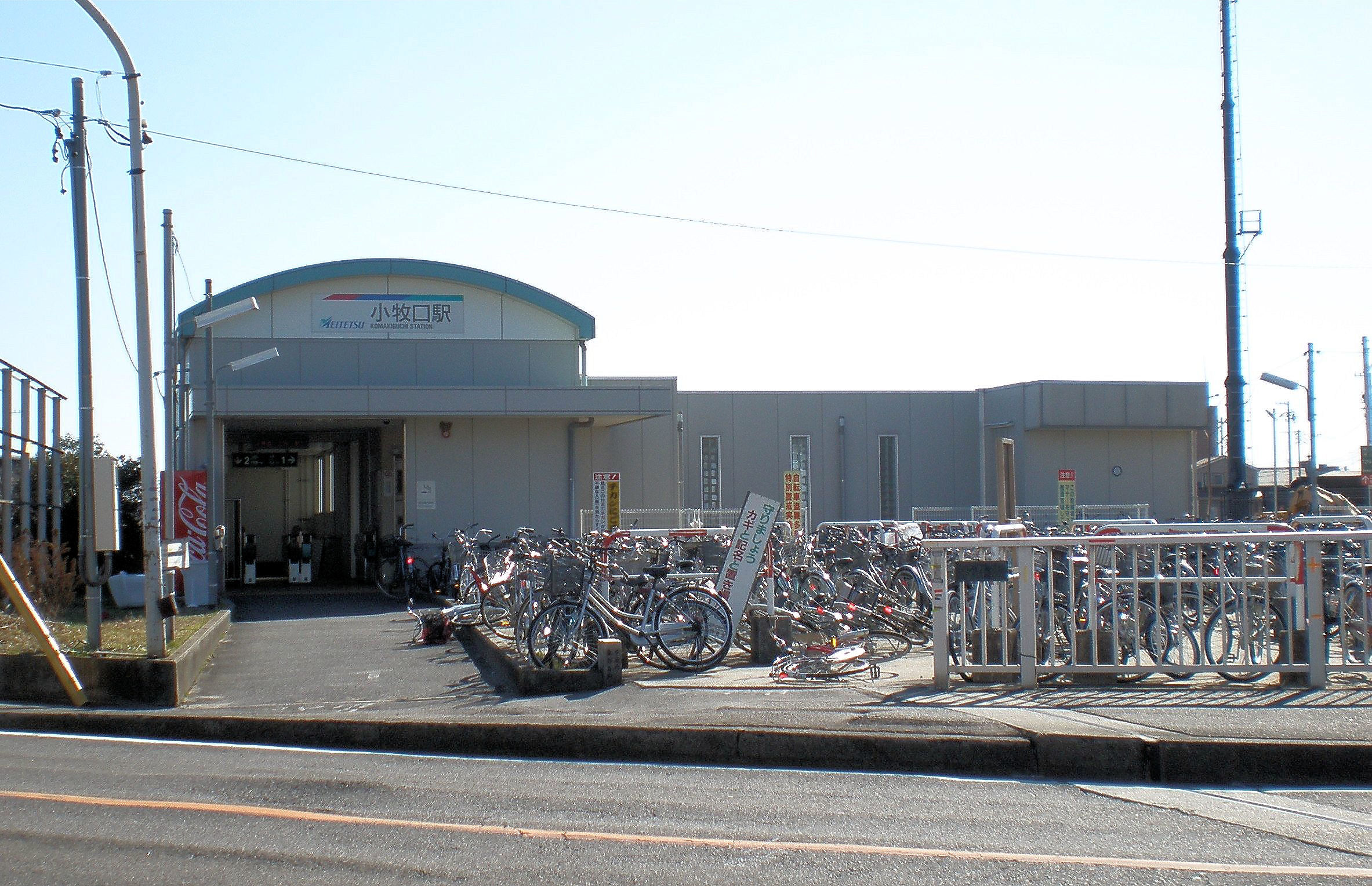 愛知県小牧市にある小牧口駅